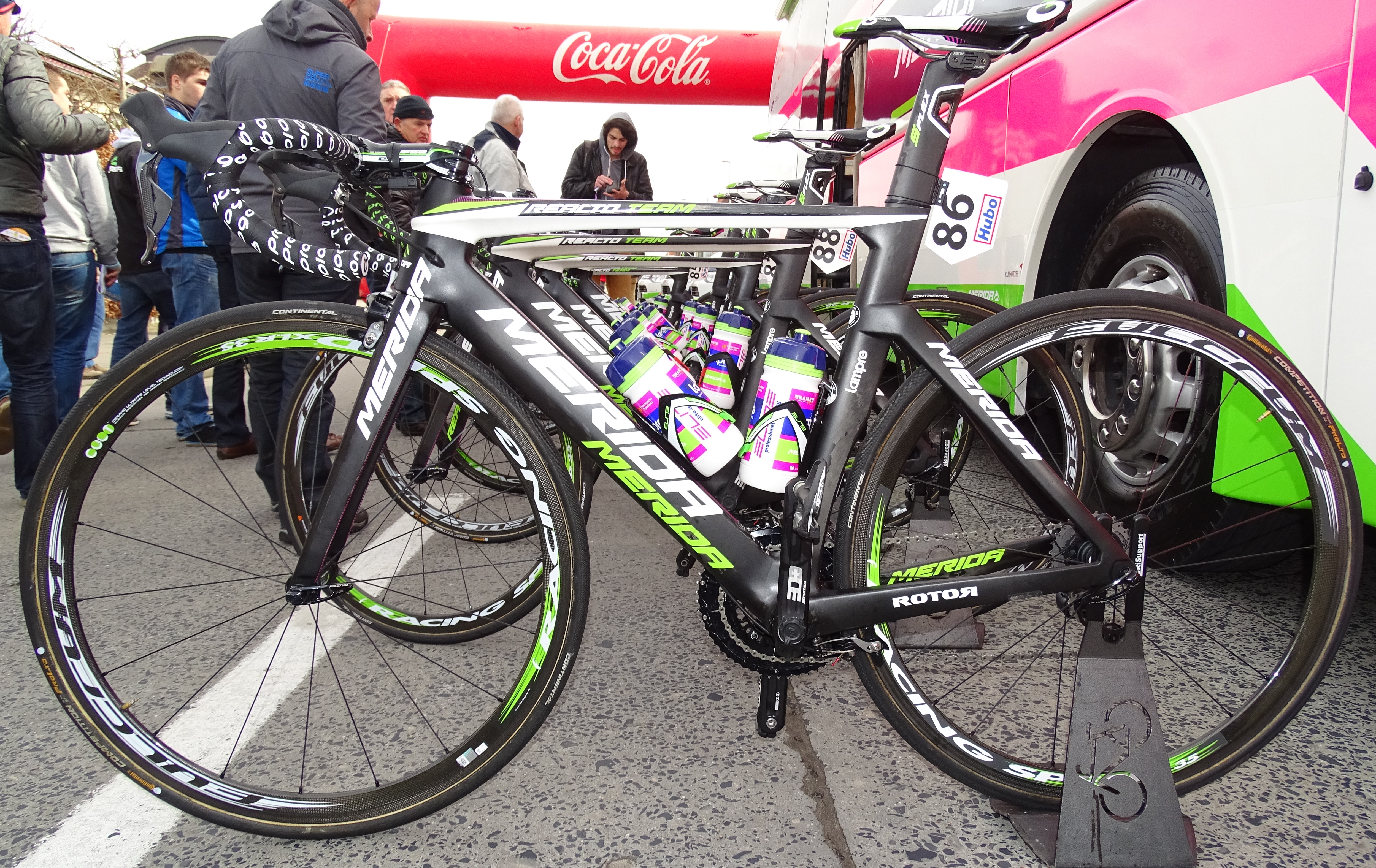 Reportage réalisé le vendredi 27 mars à l'occasion du départ et de l'arrivée du Grand Prix E3 2015 à Harelbeke, Belgique.